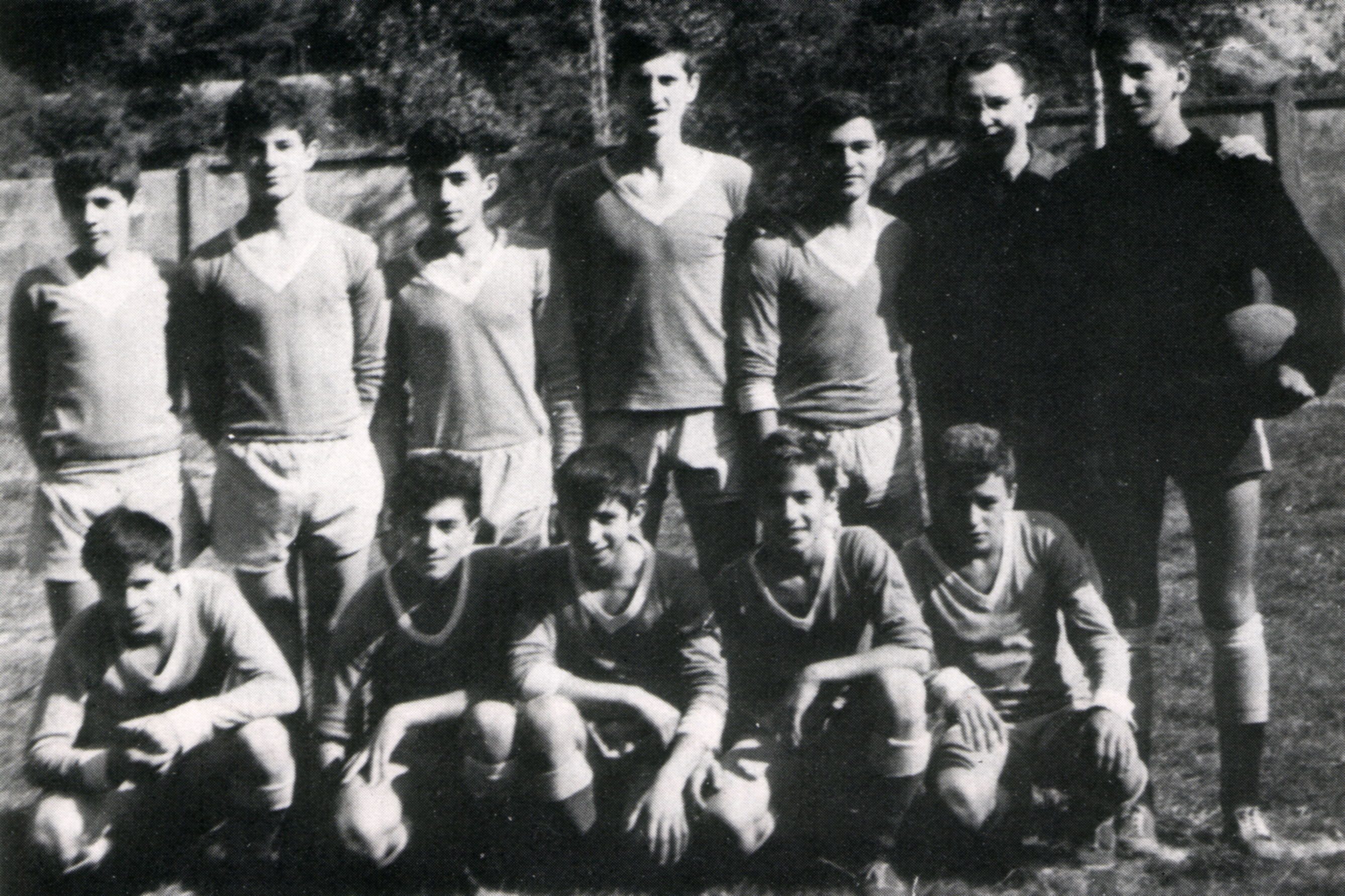 Српски (ћирилица): Првоосновани пионирски тим ФК ИМР-а 1964. г. Наумовић Јован (стоји први са лева), Стакић Петар (стоји задњи са лева) и Матевски Зоран (чучи задњи са лева) играли су и за први тим